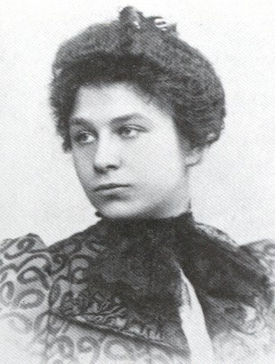 Foto non artistica risalente a un periodo precedente il 1919 di autore sconosciuto.